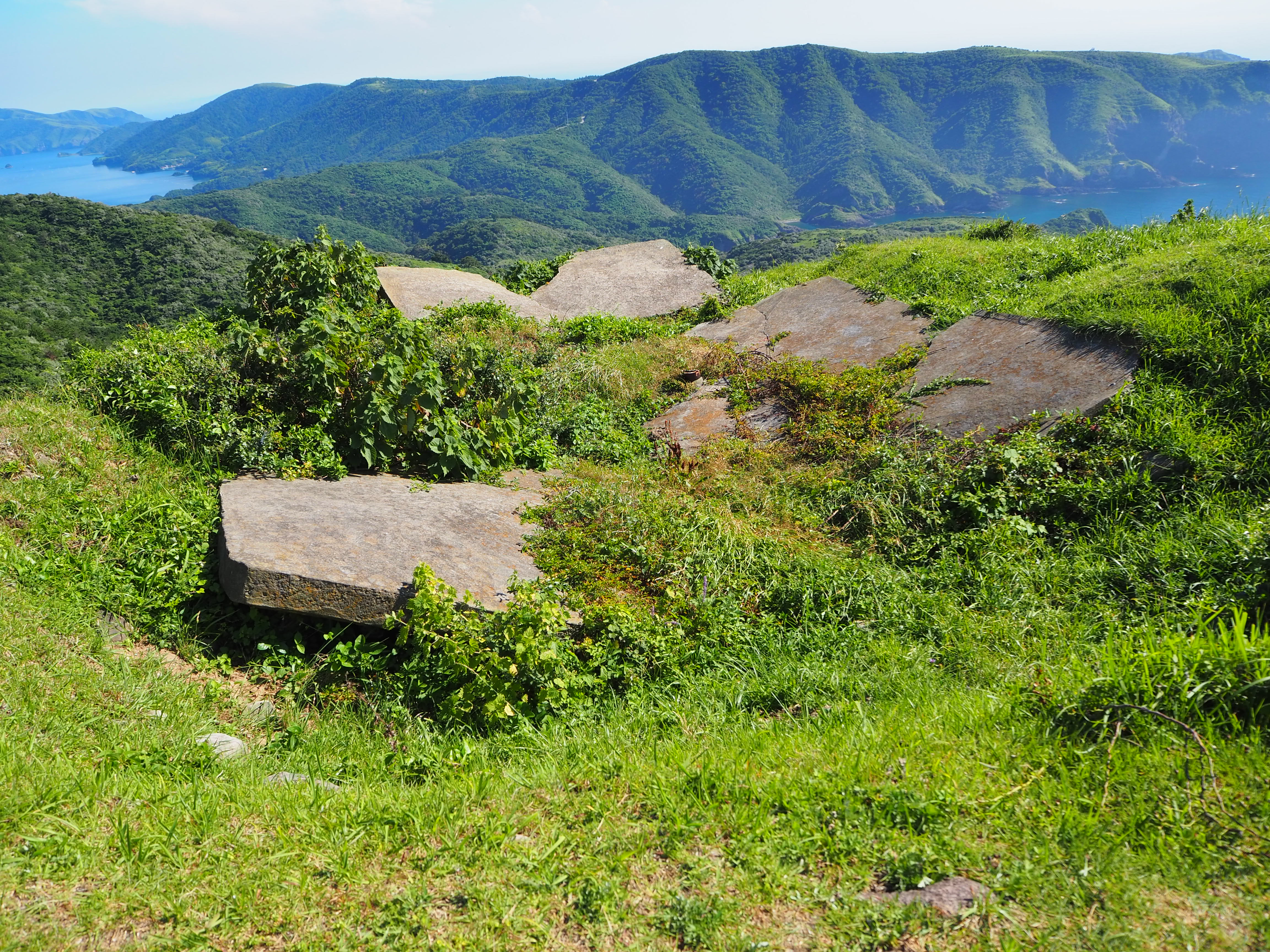 旧日本軍の監視所跡Olympus E-M10 Mark III